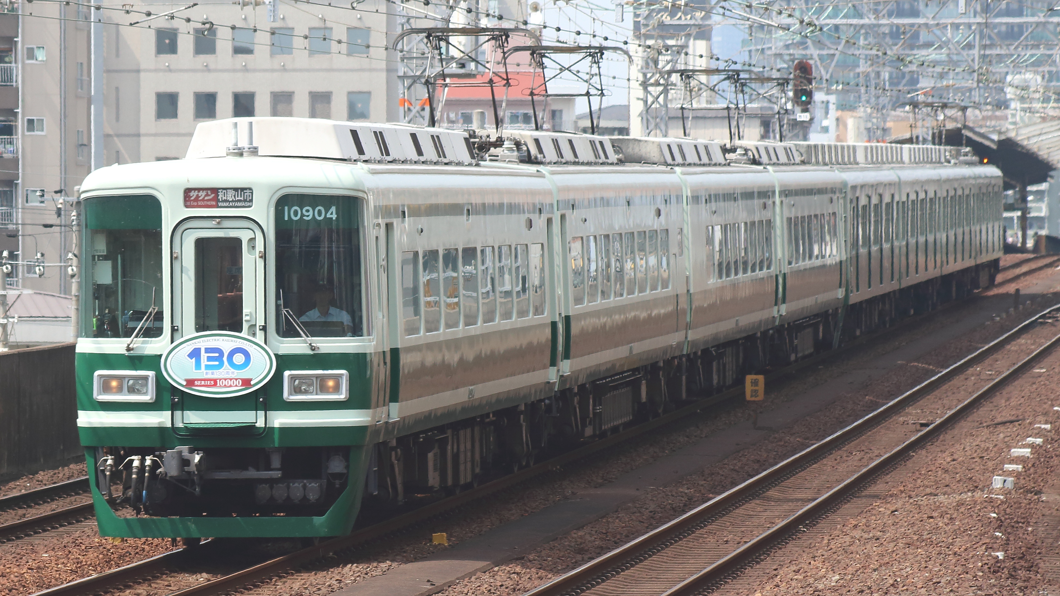 南海10000系 特急サザン 旧塗装編成 新今宮 - 萩ノ茶屋間にて